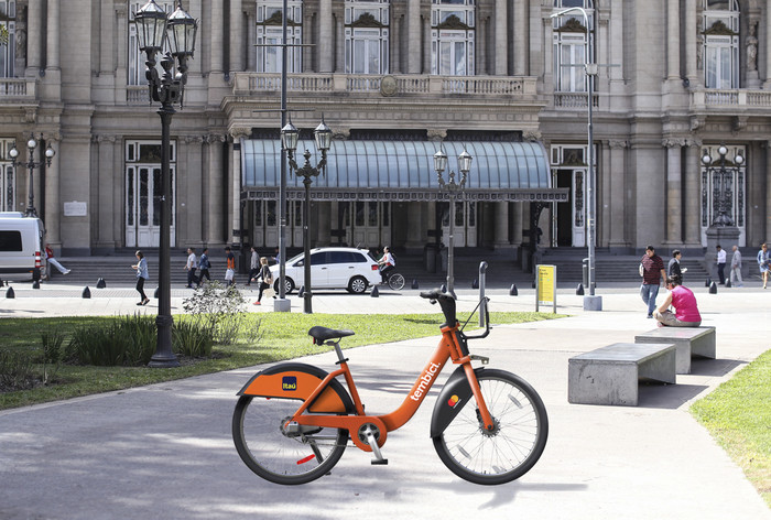 Nuevas bicicletas del sistema EcoBici en Buenos Aires, Argentina